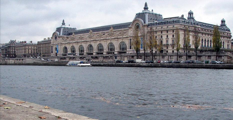 Musée Orsay